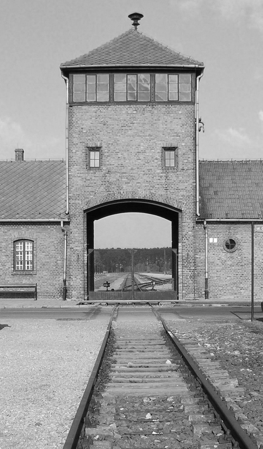 Auschwitz Birkenau - L'ingresso di Birkenau